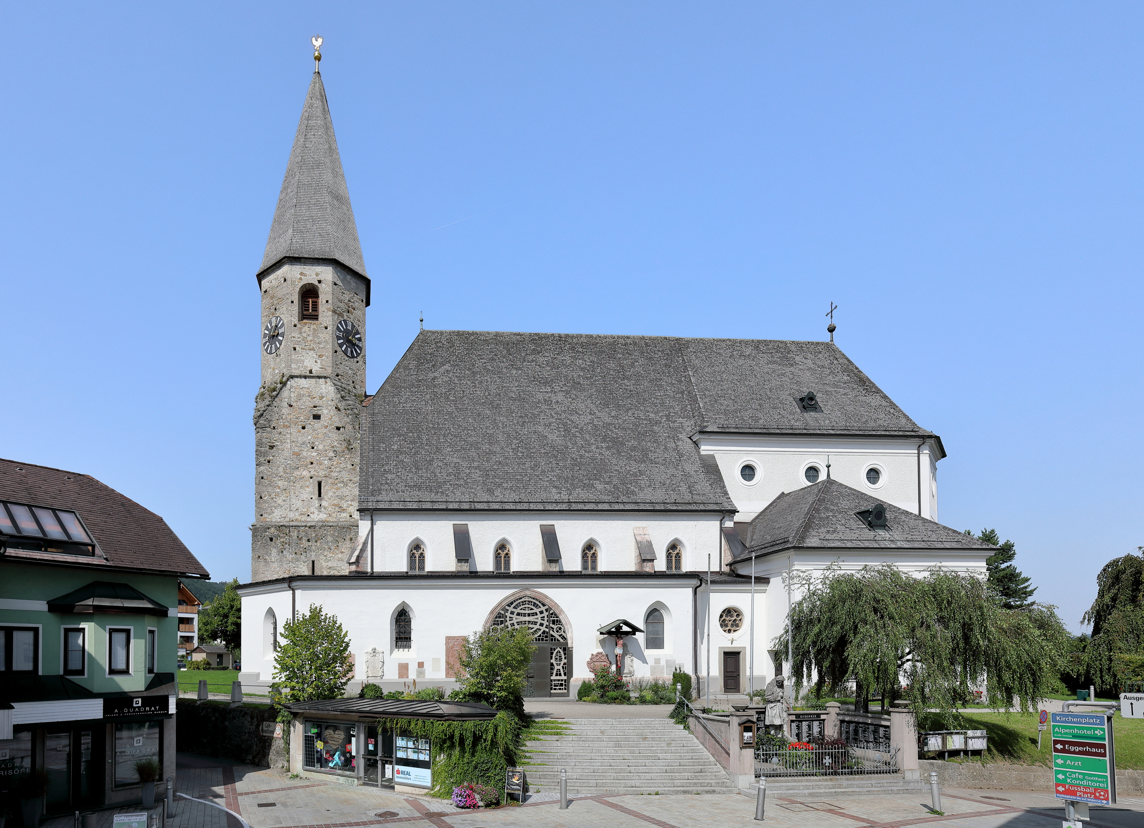 Südansicht der röm.-kath. Pfarrkirche hl. Benedikt in der oberösterreichischen Marktgemeinde Altmünster.Der massive Westturm wurde um 1300 errichtet, das dreischiffige Langhaus um 1470/80 und der Chor von 1625 bis 1629. Südseitig an die Kirche ist eine Vorhalle mit Sternrippengewölbe angebaut. An diese schließt westlich die Beichtkapelle und östlich die Allerheiligenkapelle an.